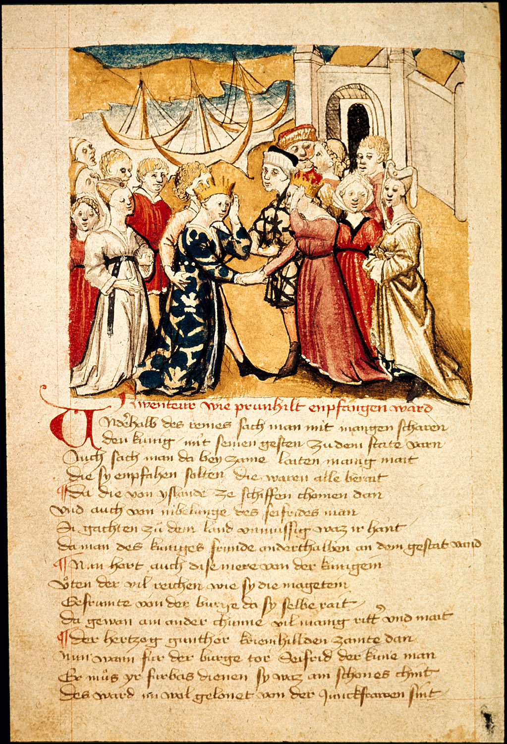 Nibelungenlied. Hundeshagenscher Kodex